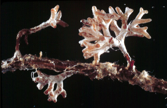 Amanita muscaria and Radiata pine ectomycorrhizae